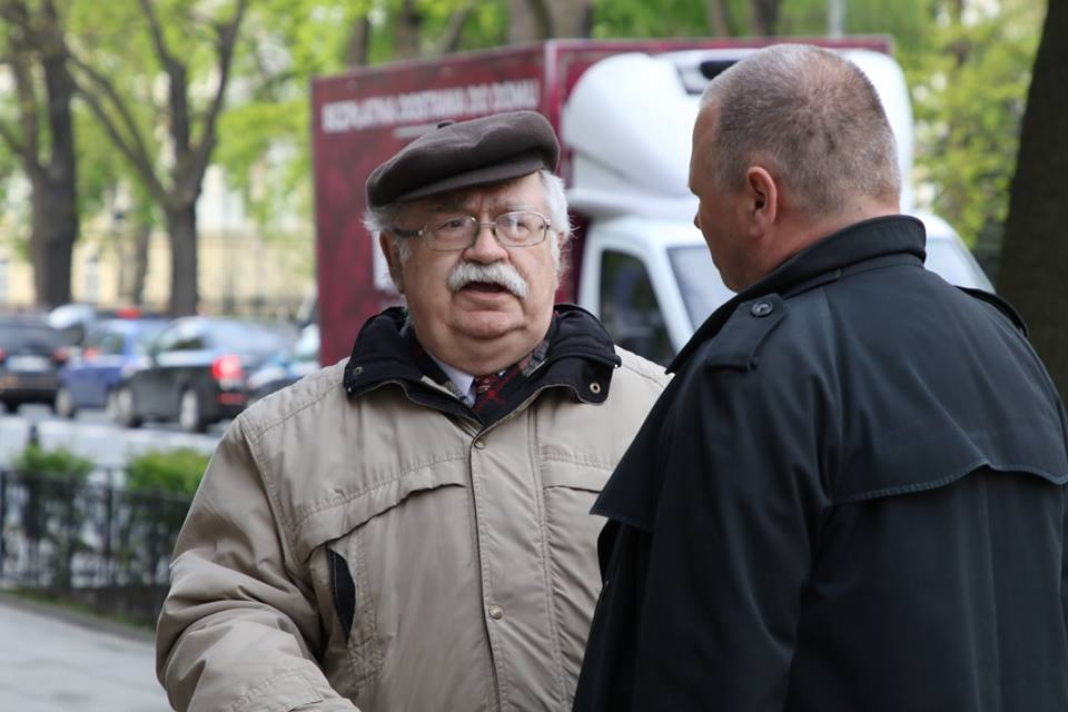 Zdjęcie Nowaka z manifestacji poparcia dla rządu Węgier